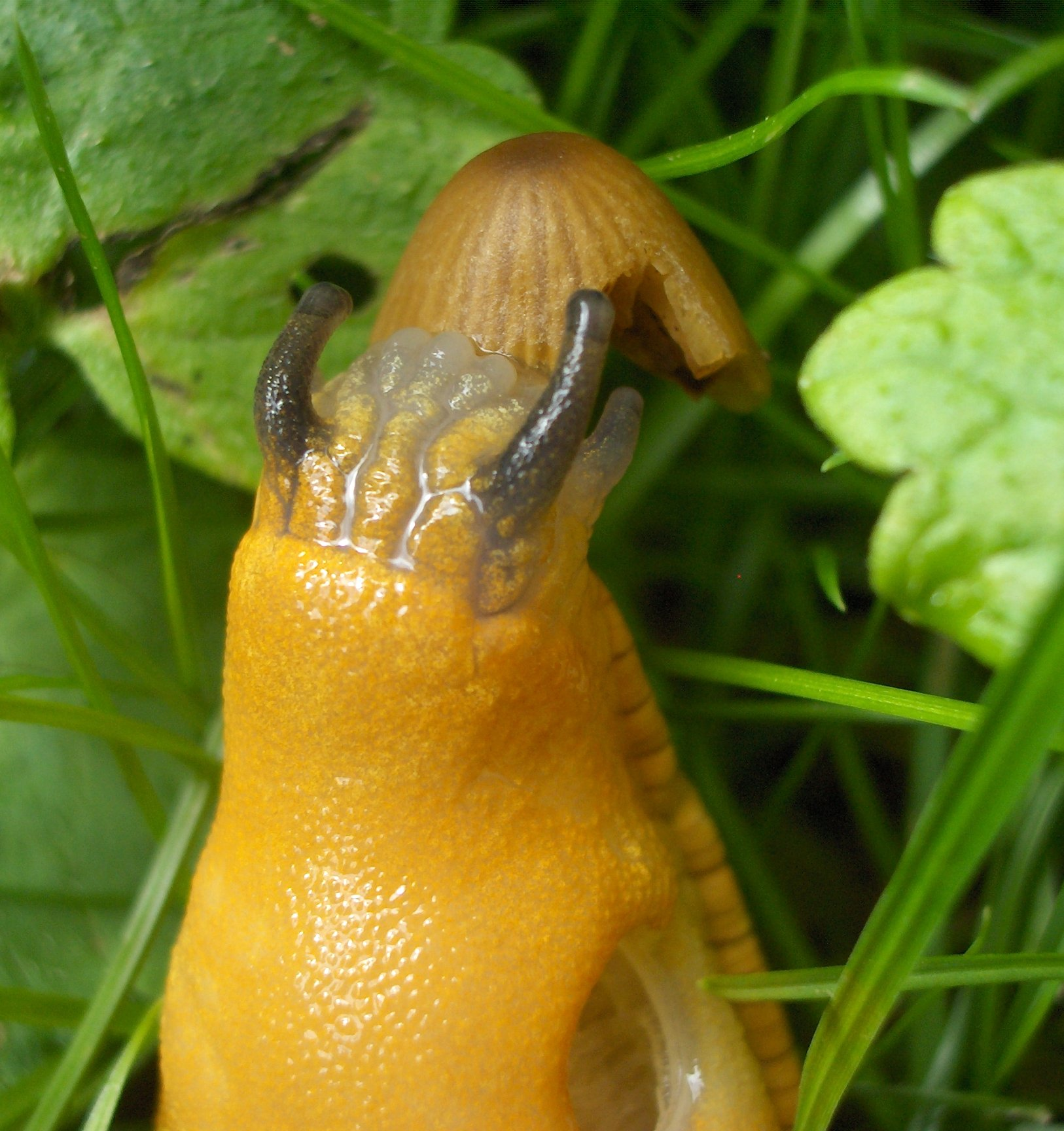 Slug from Switzerland, taken the 30/08/2006